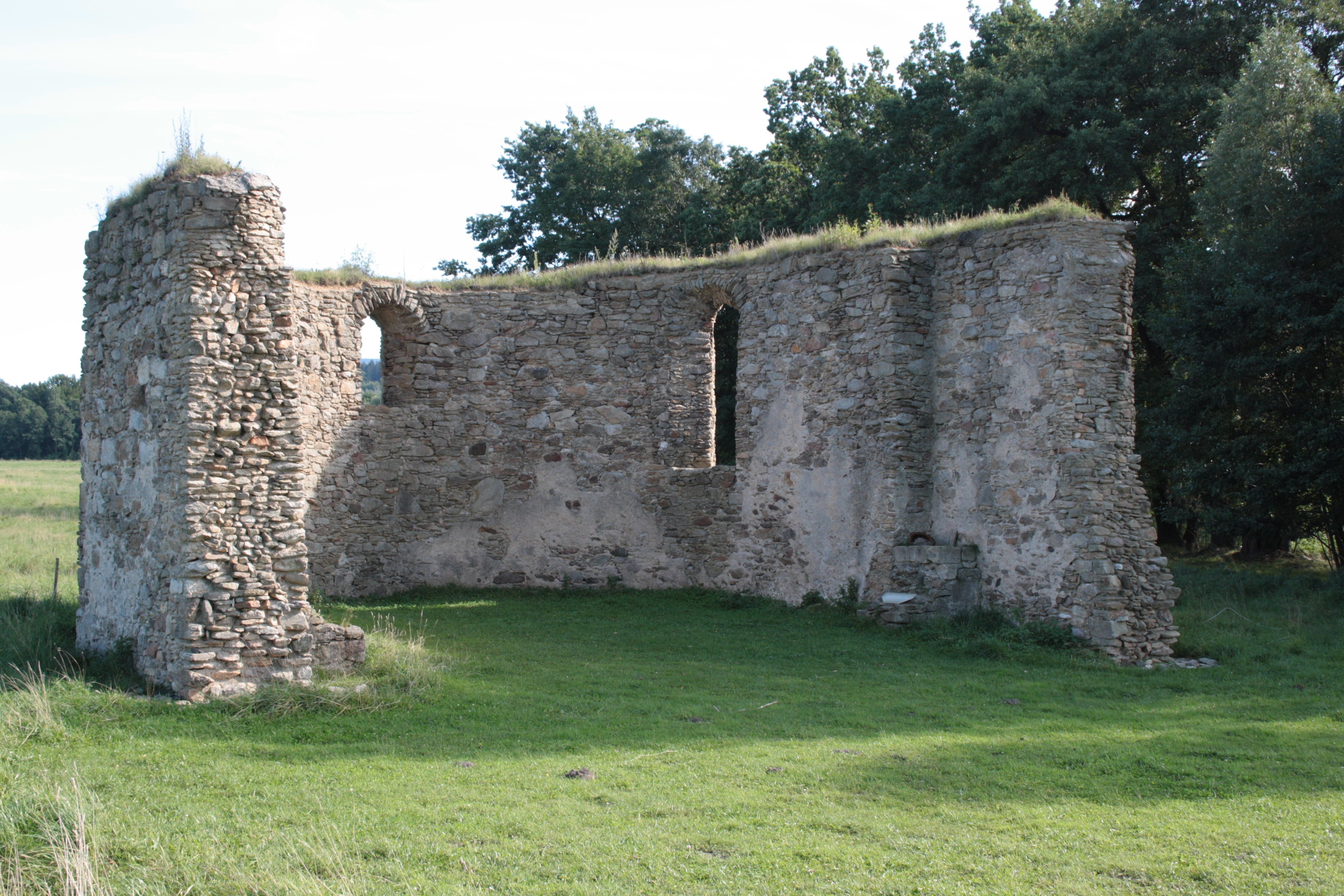 Ruiny kostela svatého Jakuba u Jindřichovic pod Smrkem (pohled ze severu).